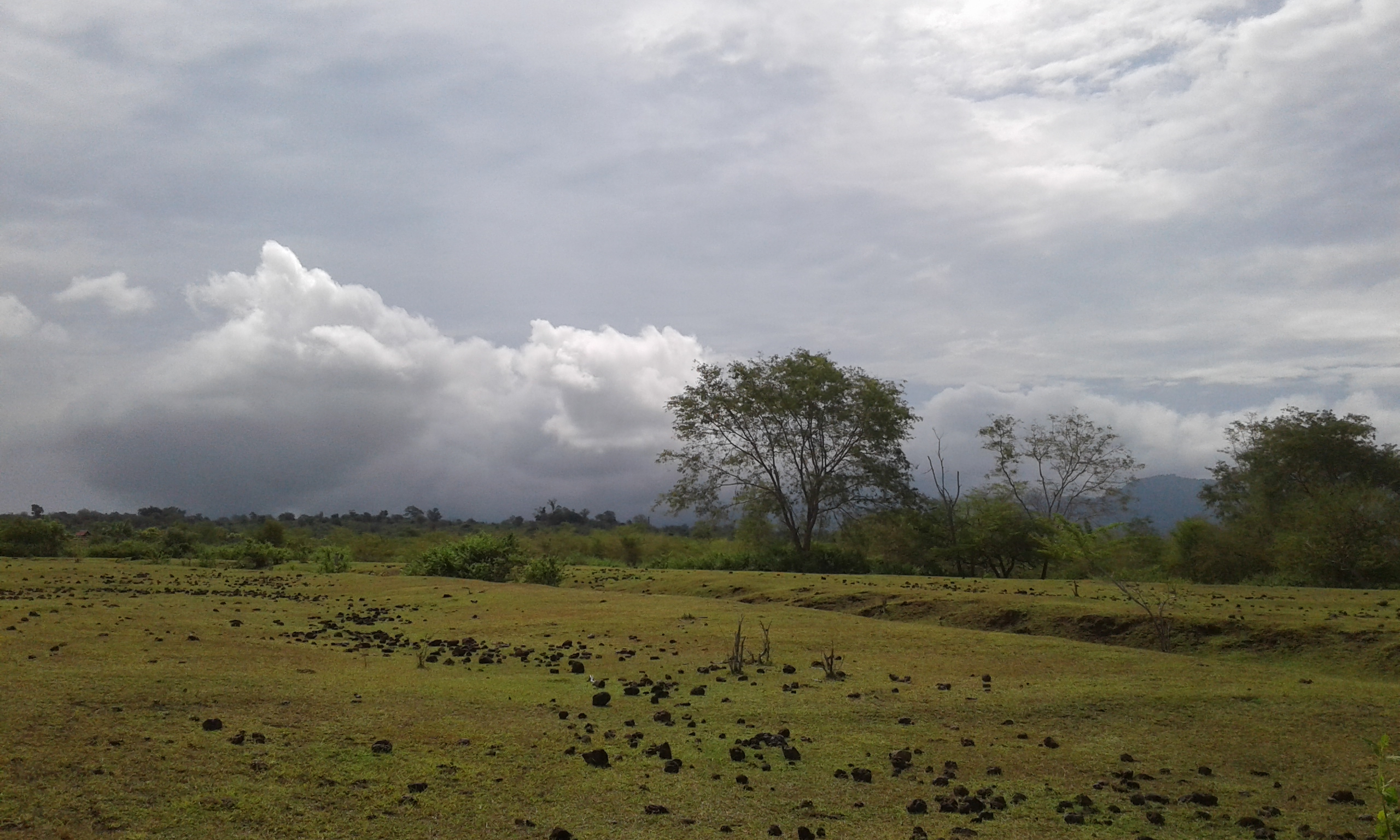 tidak seperti sabana lain yang terdiri padang rumput dan beberapa pohon yang jarang, sabana ini juga di dominasi bebatuan bekas letusan gunung tambora pada tahun 1815 sabana yang terletak di kec. kempo kab. dompu tepatnya di hodo atau kurang lebih 30 km dari gunung tambora tidak ada yang bermukim. hanya padang tempat kuda, sapi, kerbau ataupun hewan liar lainnya mencari makan